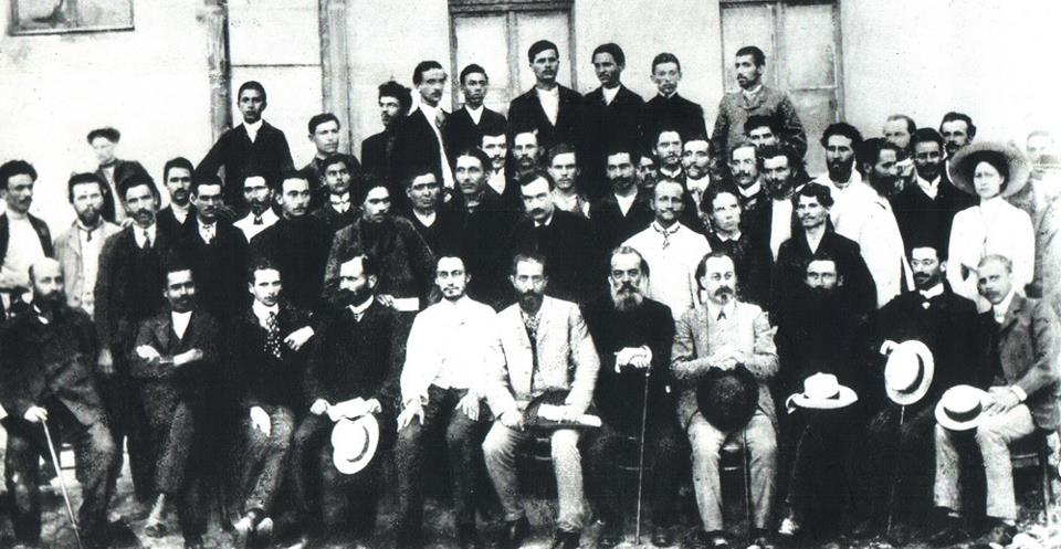 ІV- ти конгрес на ОРСС 1907